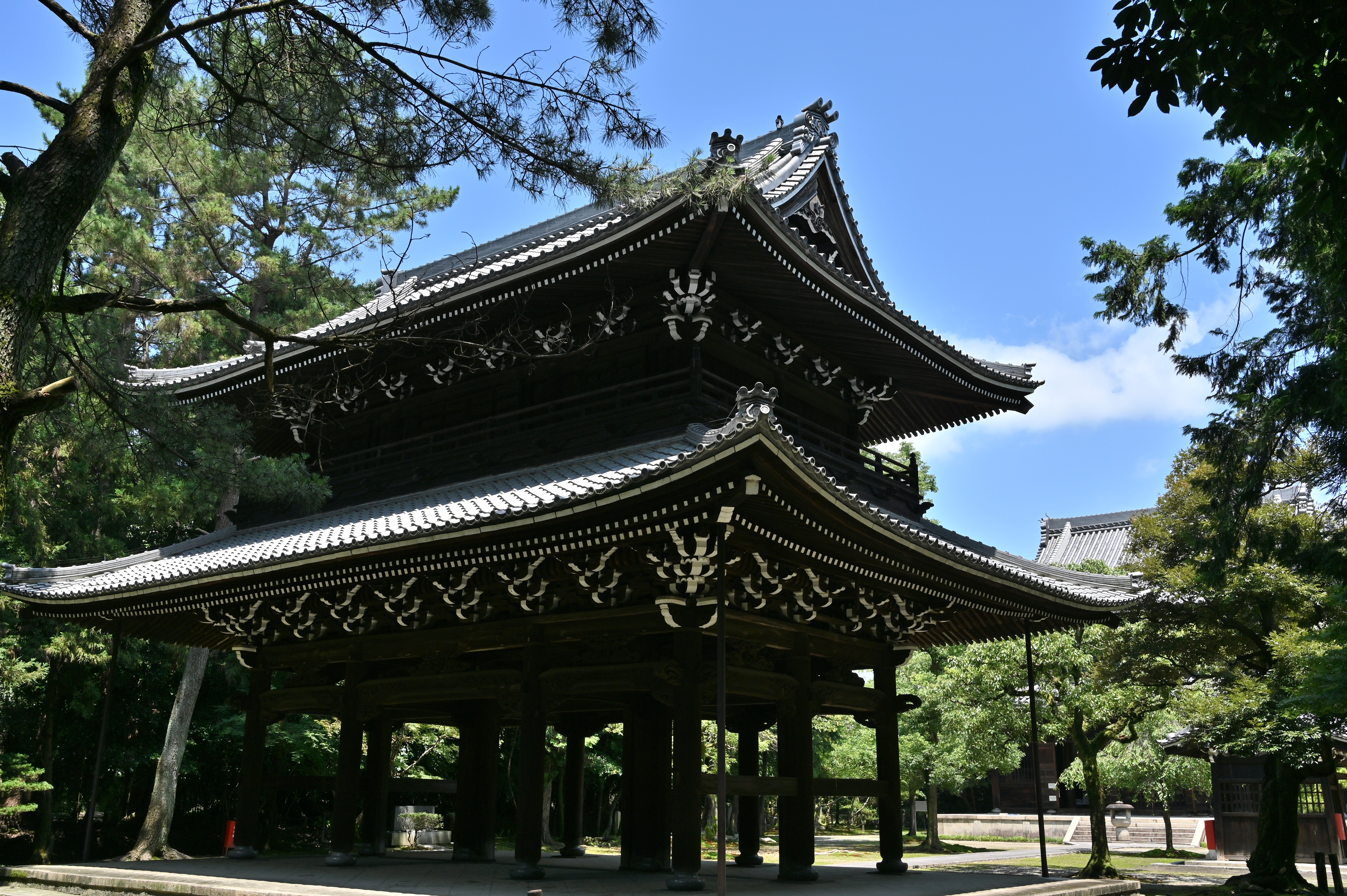 妙興寺の境内伽藍配置